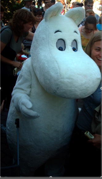 Muumitroll